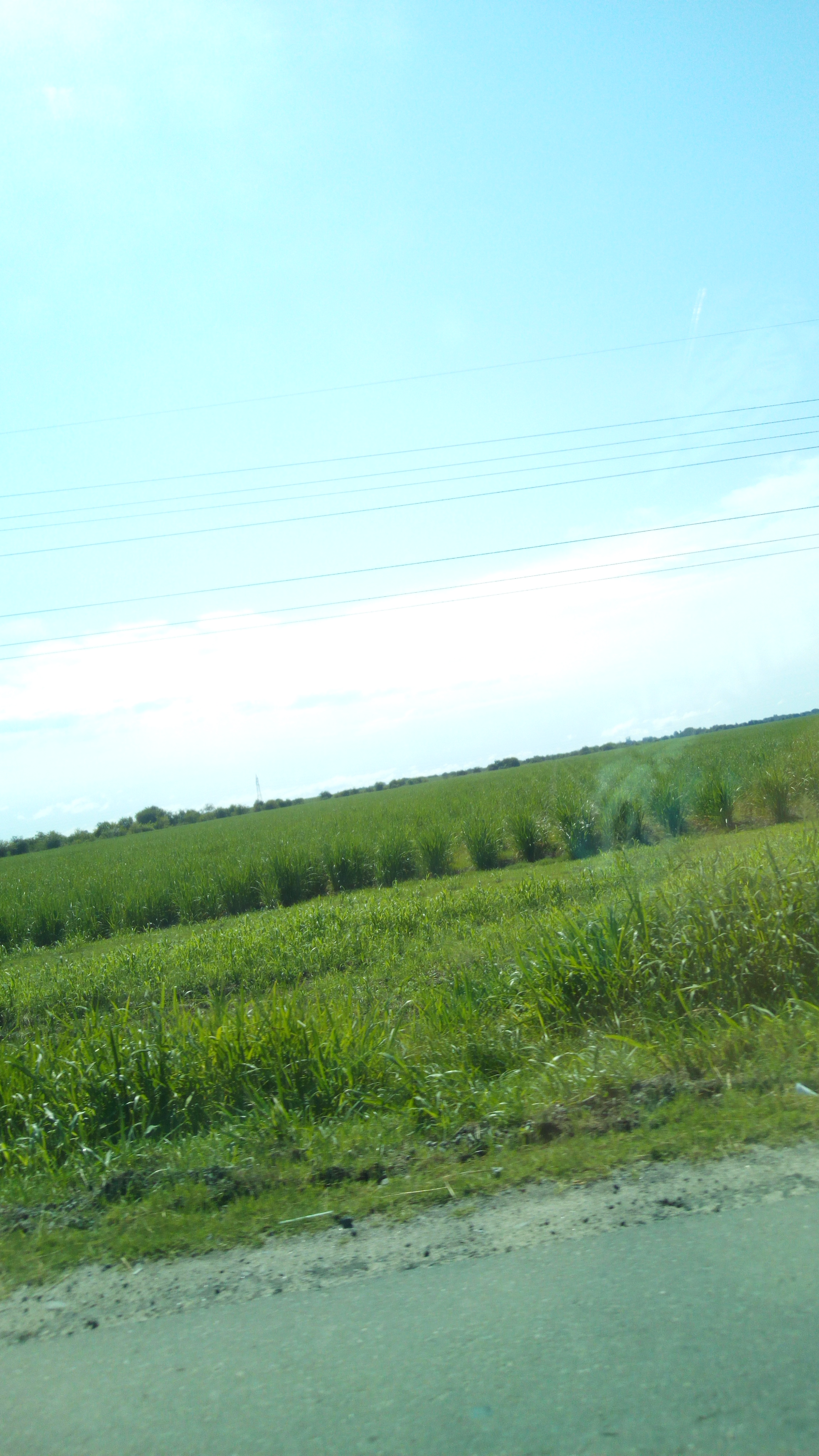 Esta fotografía fue capturada,en un viaje de vacaciones 09/01/2018